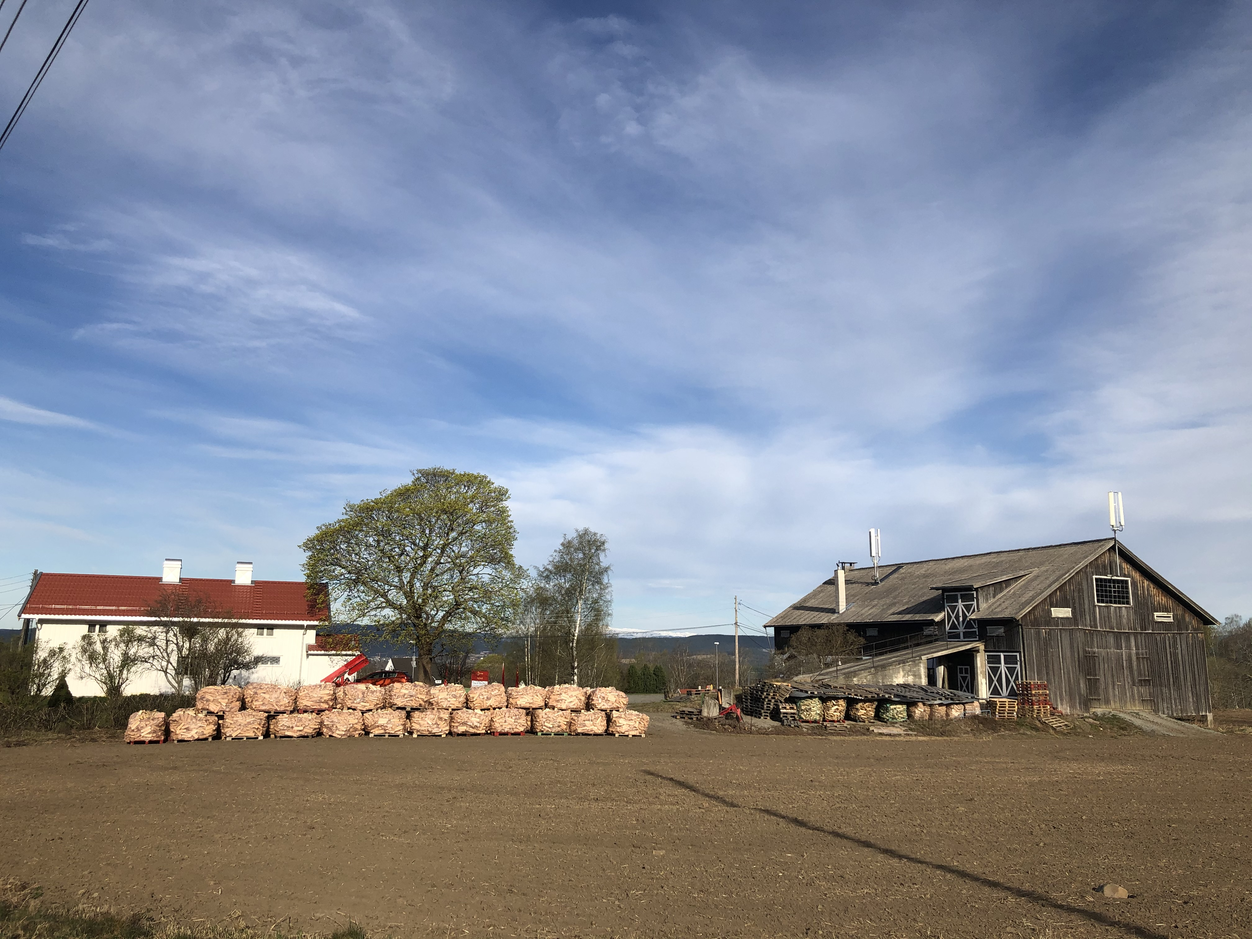 Haug gård, Toppveien 2, Ringerike